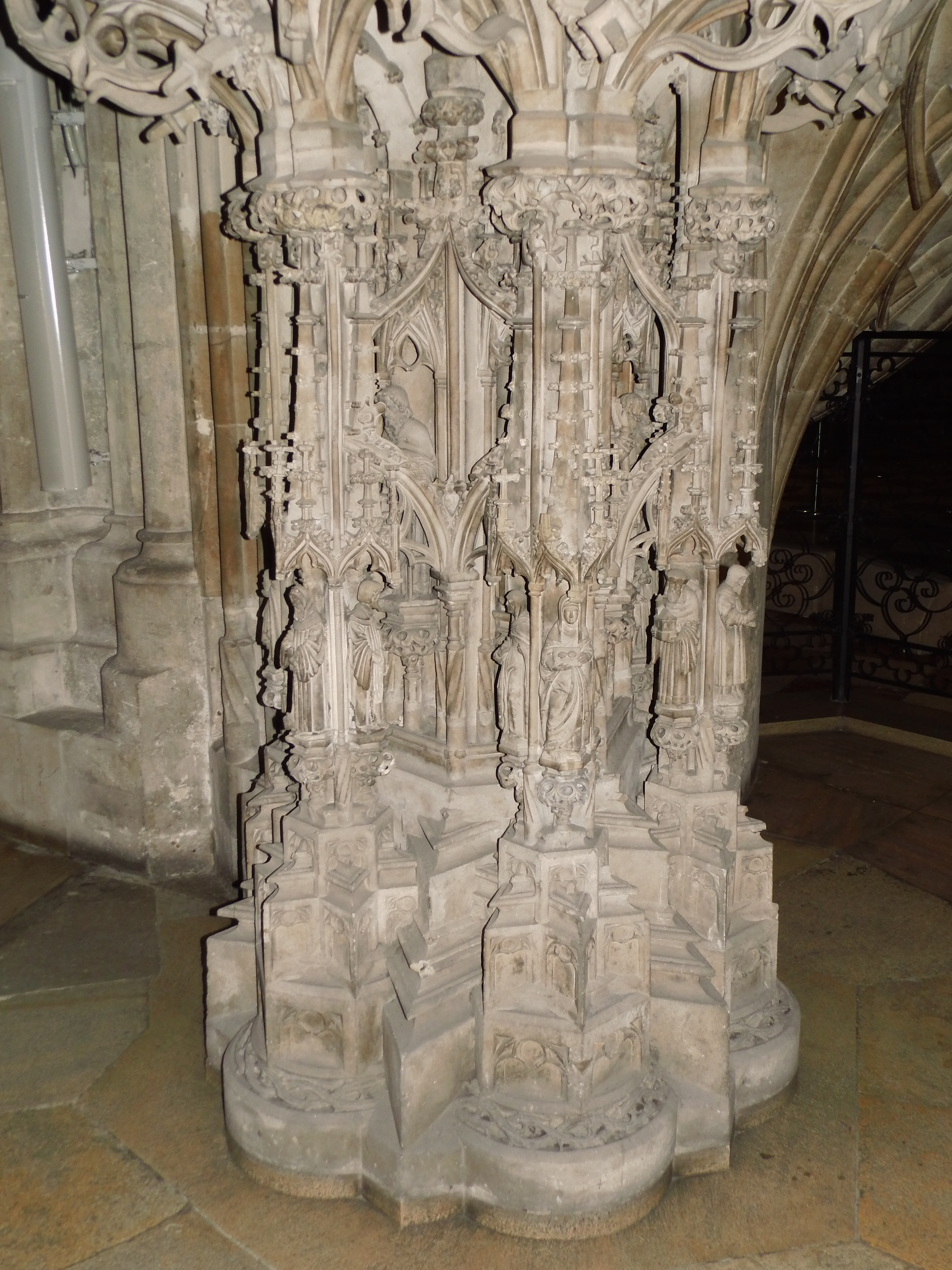 Fuß der Kanzel des Stephansdoms (Wien)